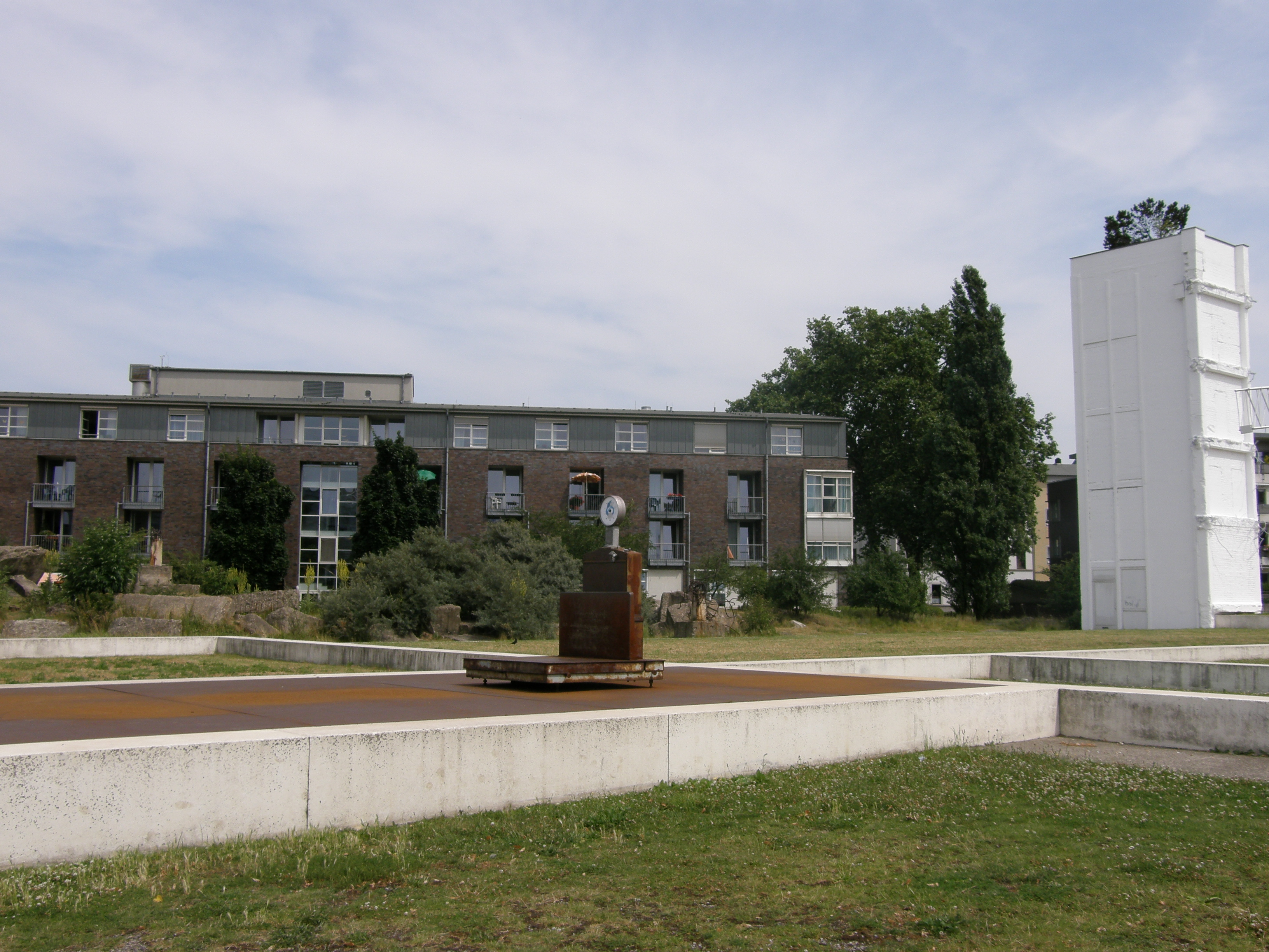 Garten der Erinnerung von Dani Karavan im Innenhafen von Duisburg, in der Mitte die alte Getreidewaage, rechts das ehemalige Treppenhaus der Sparzentrale, link hinten das Seniorenzentrum